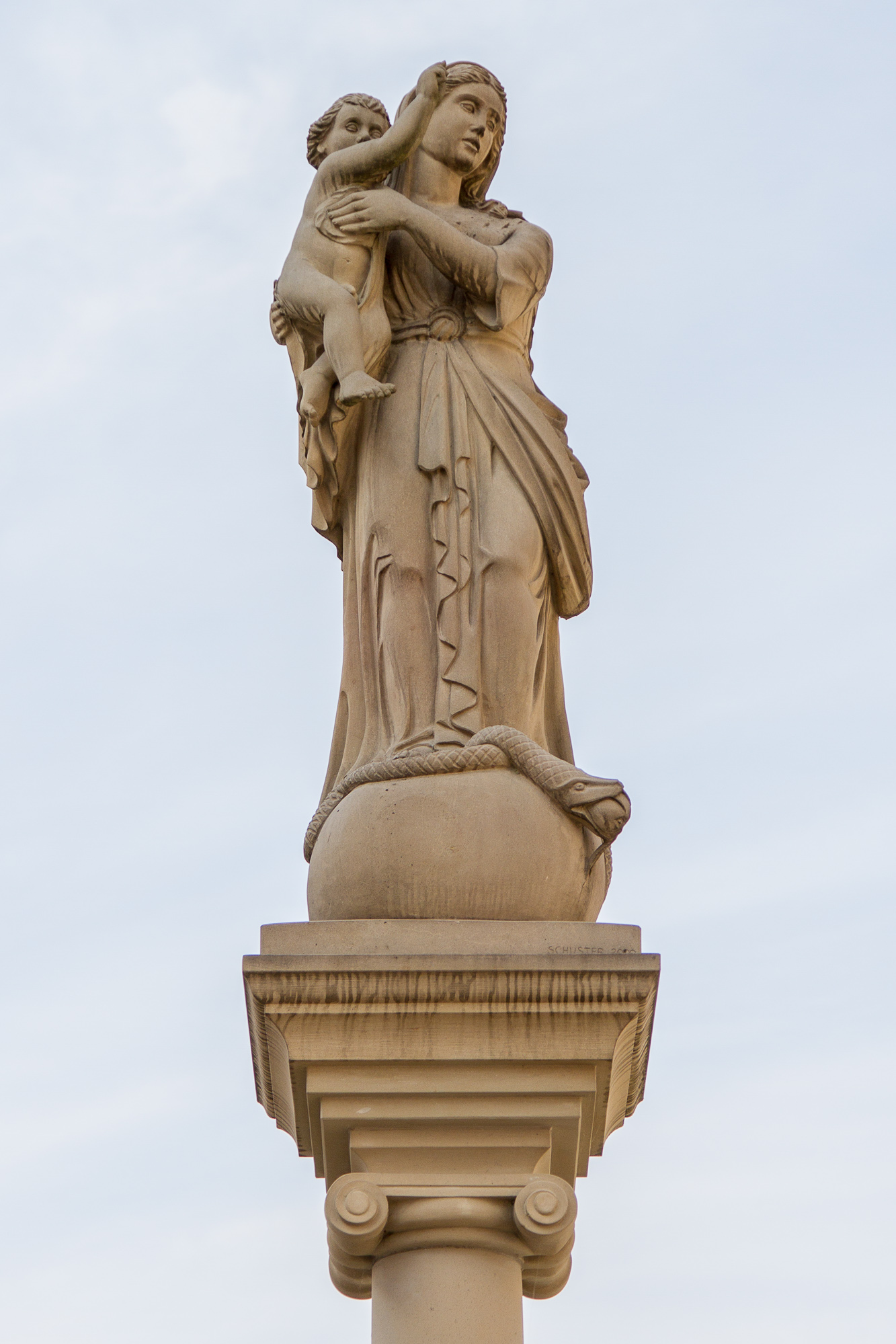 Mariensäule; Maria Immaculata, Säulenbildstock aus Sandstein, um 1800 von Christoph Wachter (1747-1812), Aufstellung 1833.This is a photograph of an architectural monument.